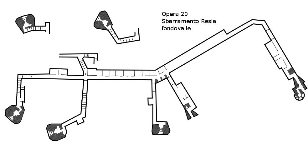 piantina opera 20, passo resia